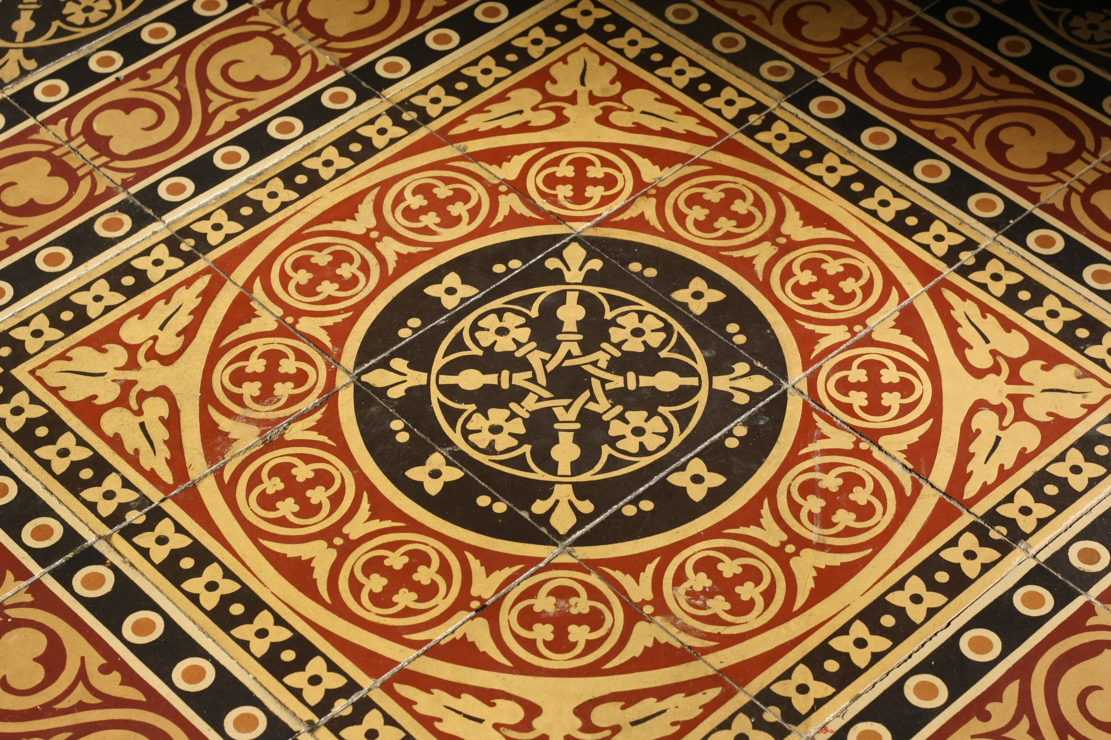 Bodenfliesen der Kapelle Zur Schmerzhaften Muttergottes in Reimerzhoven, einem Ortsteil von Altenahr (siehe Heiß gebrannt und unverwüstlich. 140 Jahre Fliesen aus Sinzig, Sinzig 2011, ISBN 978-3-9303376-76 Invalid ISBN-6 [ISBN lt. Eindruck im Buch])